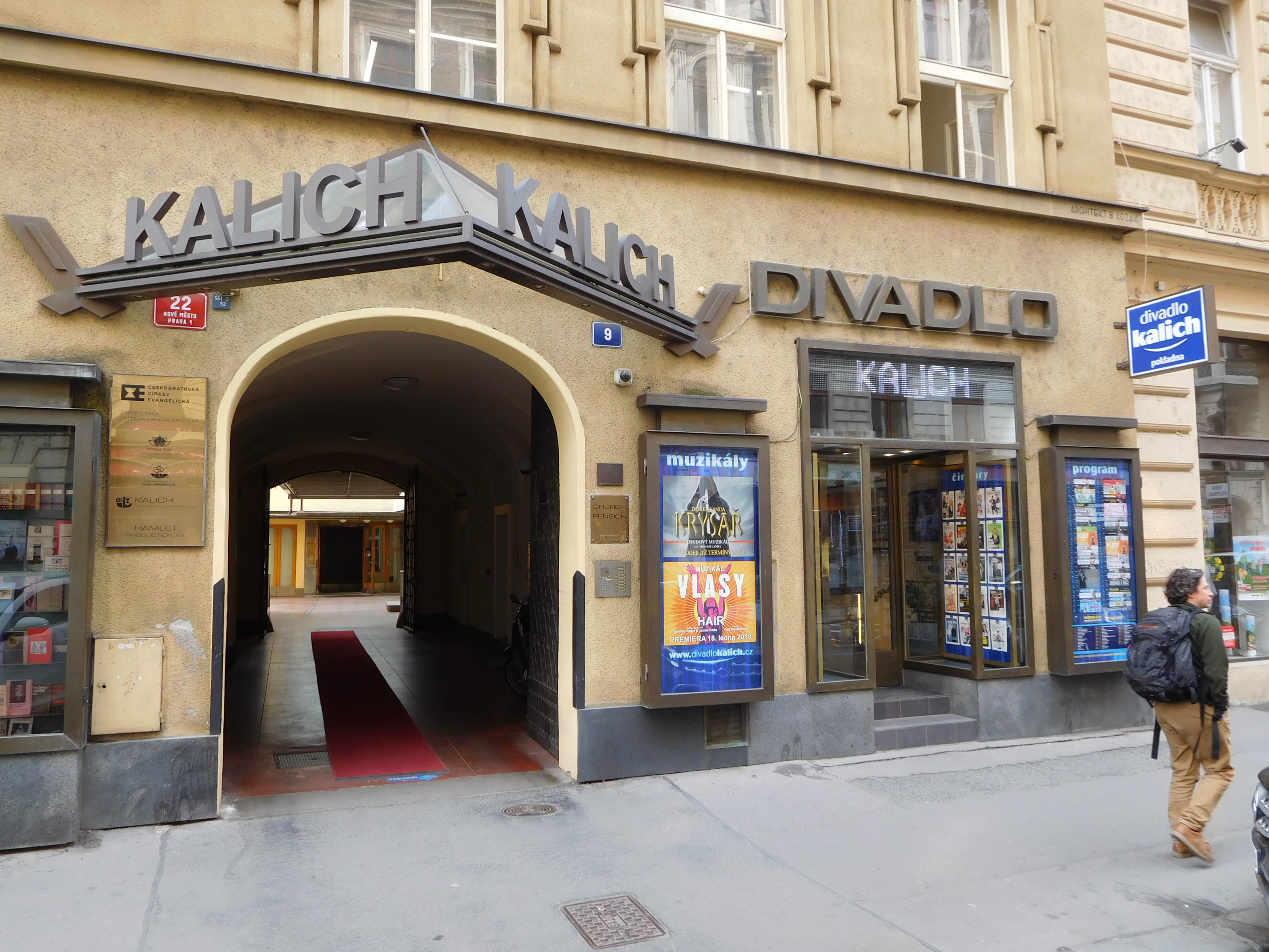 Praha - Nové Město, Jungmannova 9, Divadlo Kalich